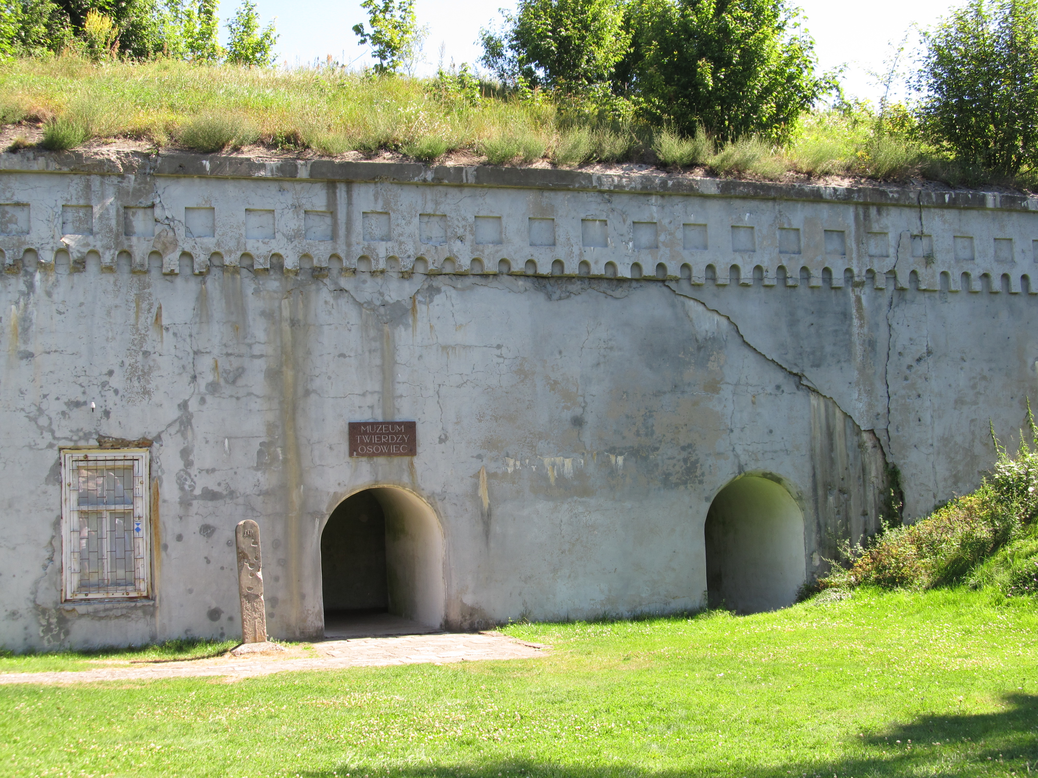 Osowiec-Twierdza (w rejestrze: Osowiec) - zespół Twierdzy Osowiec: - Fort I (Góra Skorbielewa), mur., 1882-1892 - Fort II (pozycja zarzeczna), mur., 1882-1892 - Fort III, mur., 1882-1892 - Fort IV, mur., 1882-1892 Zabytek nr A-551 z 09.10.1998